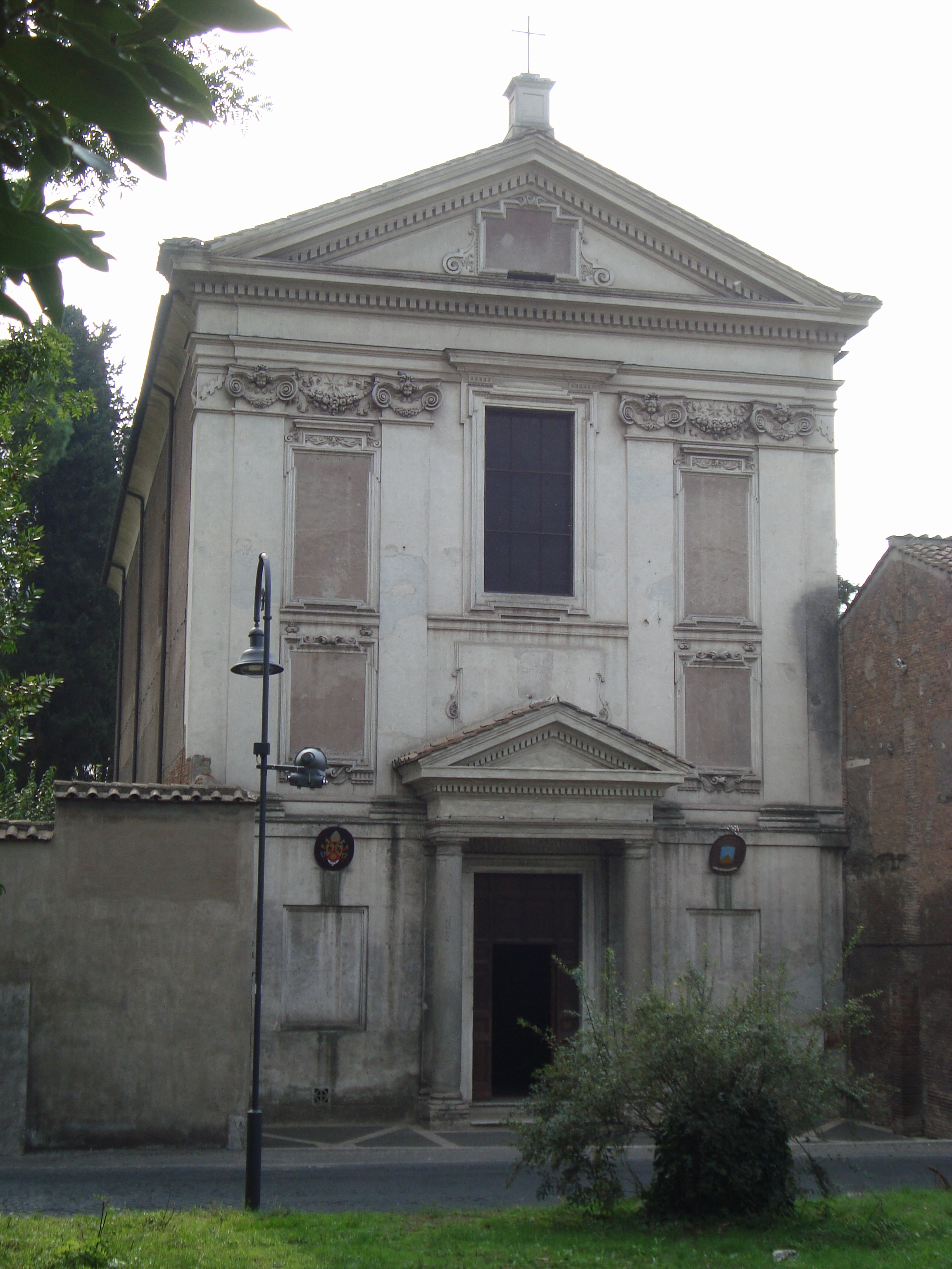 Eglise San Cesareo de Appia a Rome